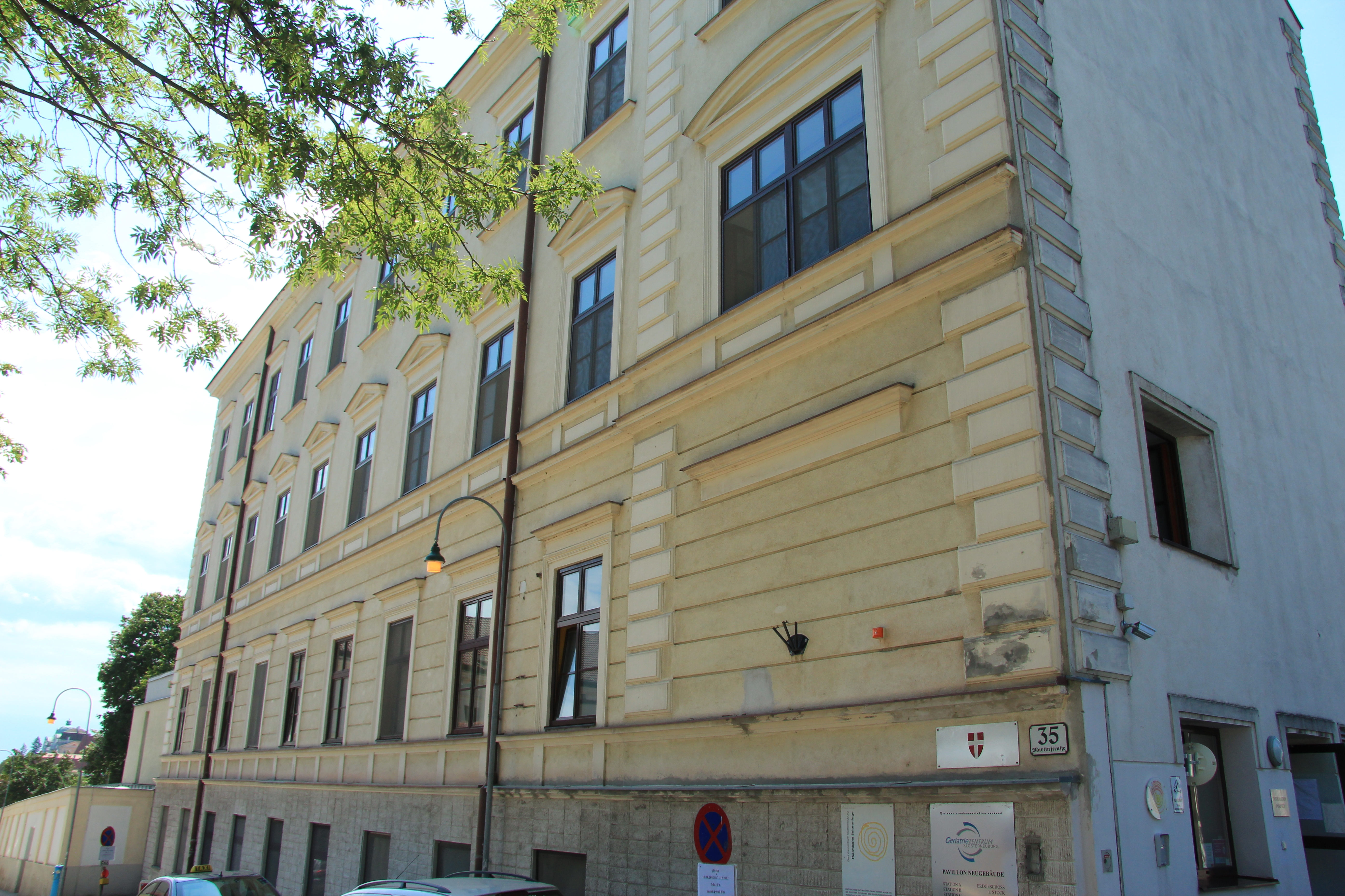 Pflegeheim der Stadt Wien, sog. Neubau sowie Ummauerung Object location48° 18′ 44.53″ N, 16° 19′ 13.8″ E